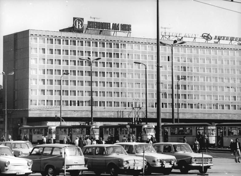 Leipzig, "Interhotel am Ring", Straßenbahn ADN-ZB Gahlbeck 9.11.1974 Leipzig: Interhotel am Ring